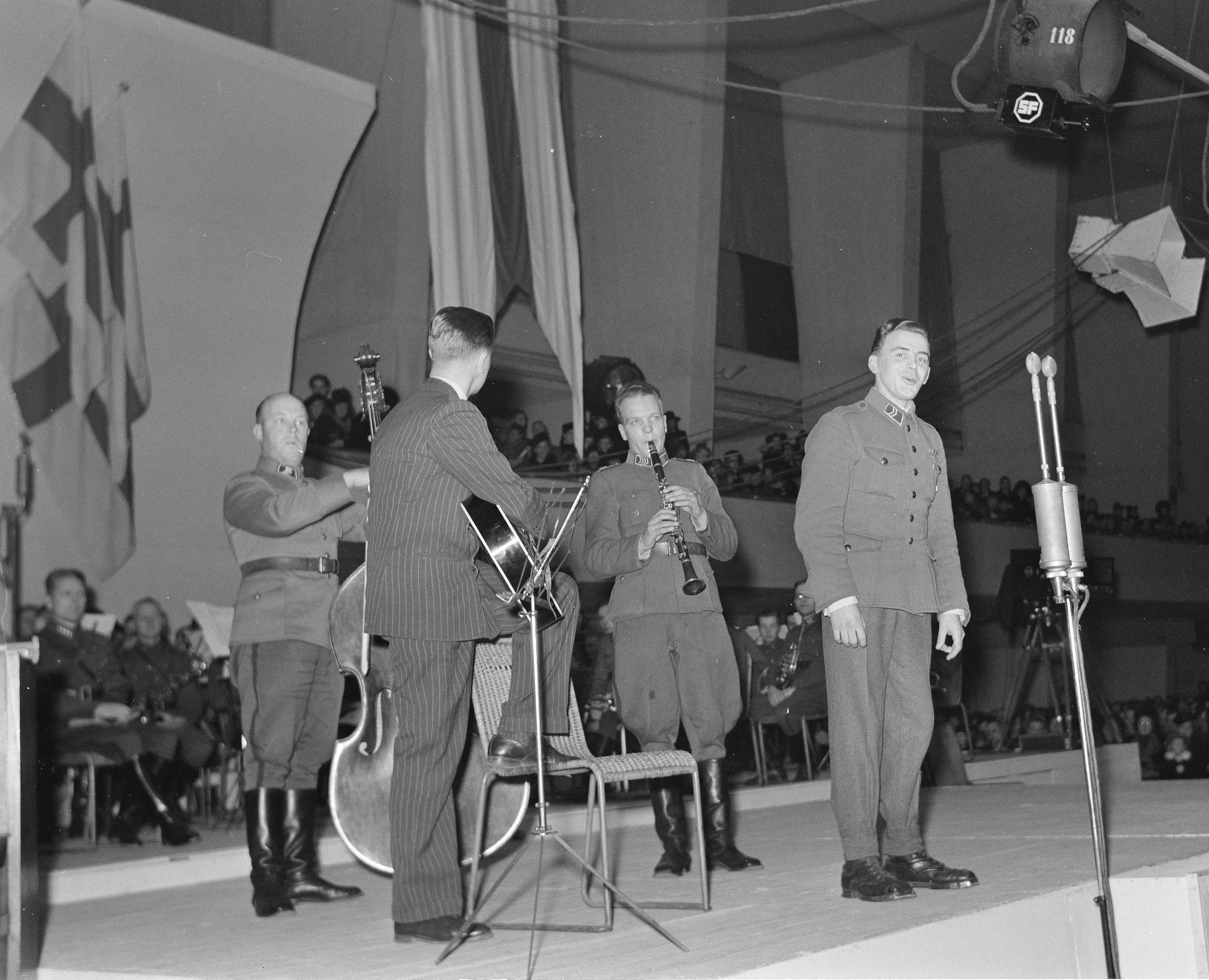 Asemiesilta Messuhallissa. Esiintymässä alikersantti Olavi Virta ja yhtye.